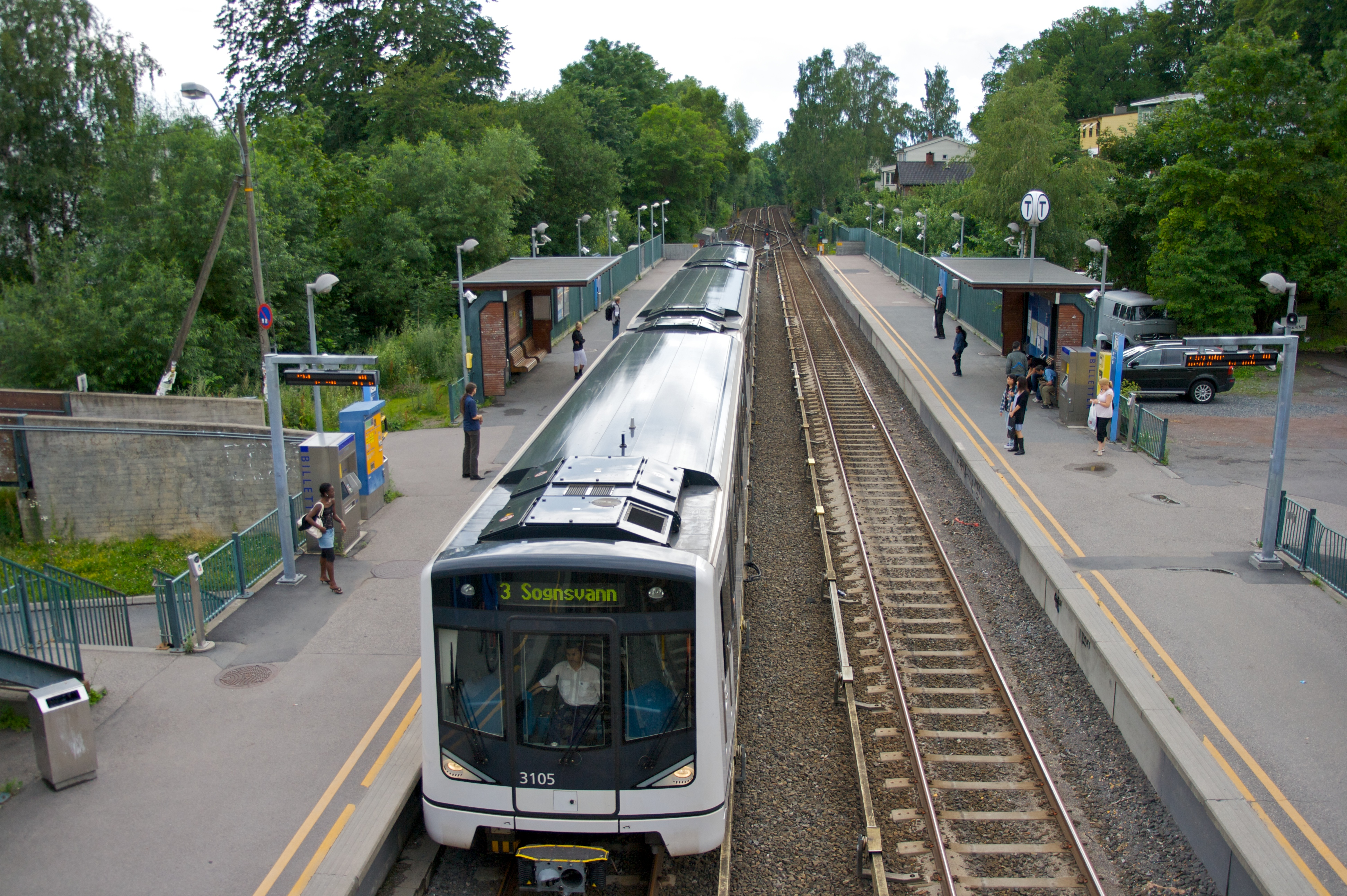 Blindern T-bane, Oslo.